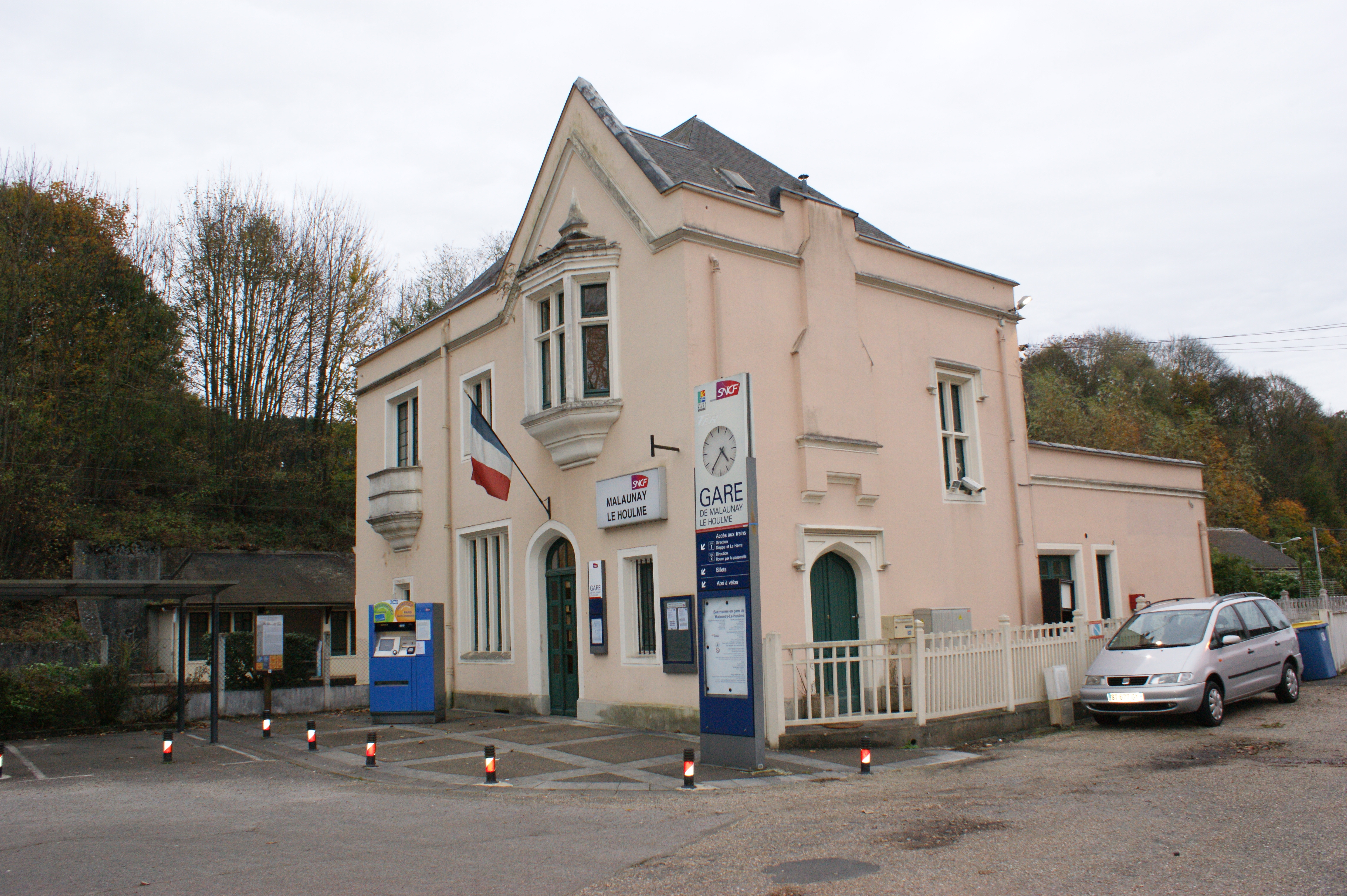 La gare de Malaunay - Le Houlme, le bâtiment voyageurs et l'entrée de la gare.